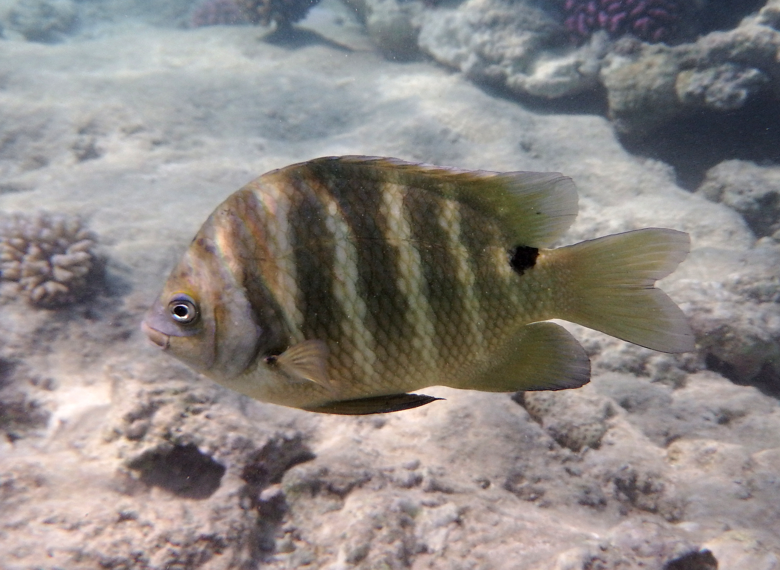 Abudefduf sordidus im Roten Meer.